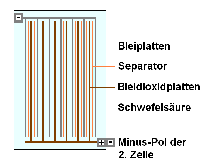 Schema einer Zelle eines Bleiakkumulators